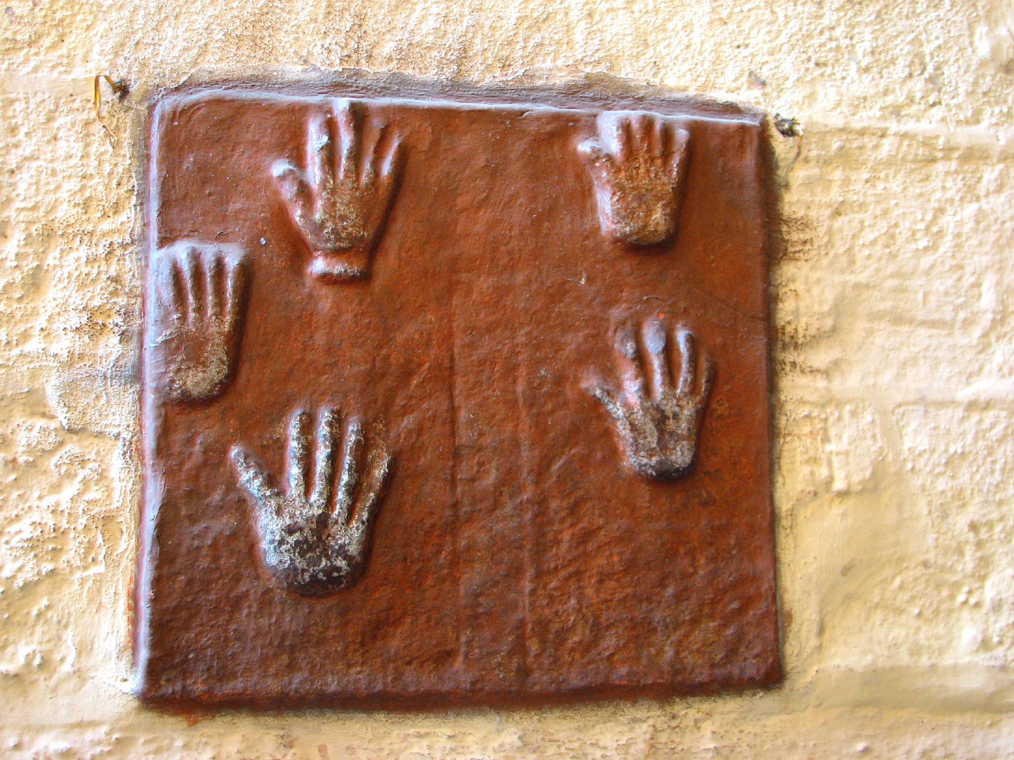 Suti hands